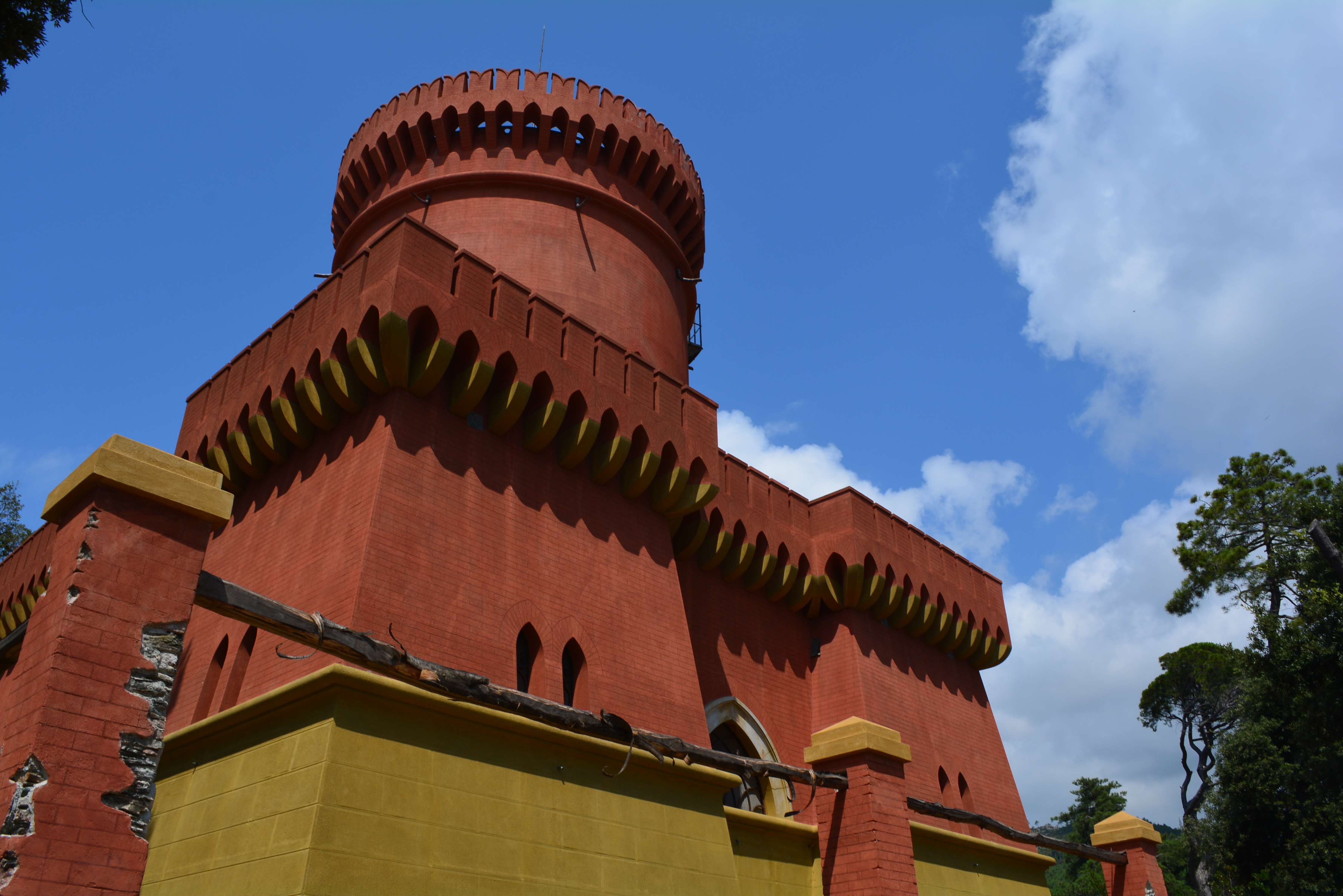 Parco e Villa Pallavicini This is a photo of a monument which is part of cultural heritage of Italy.